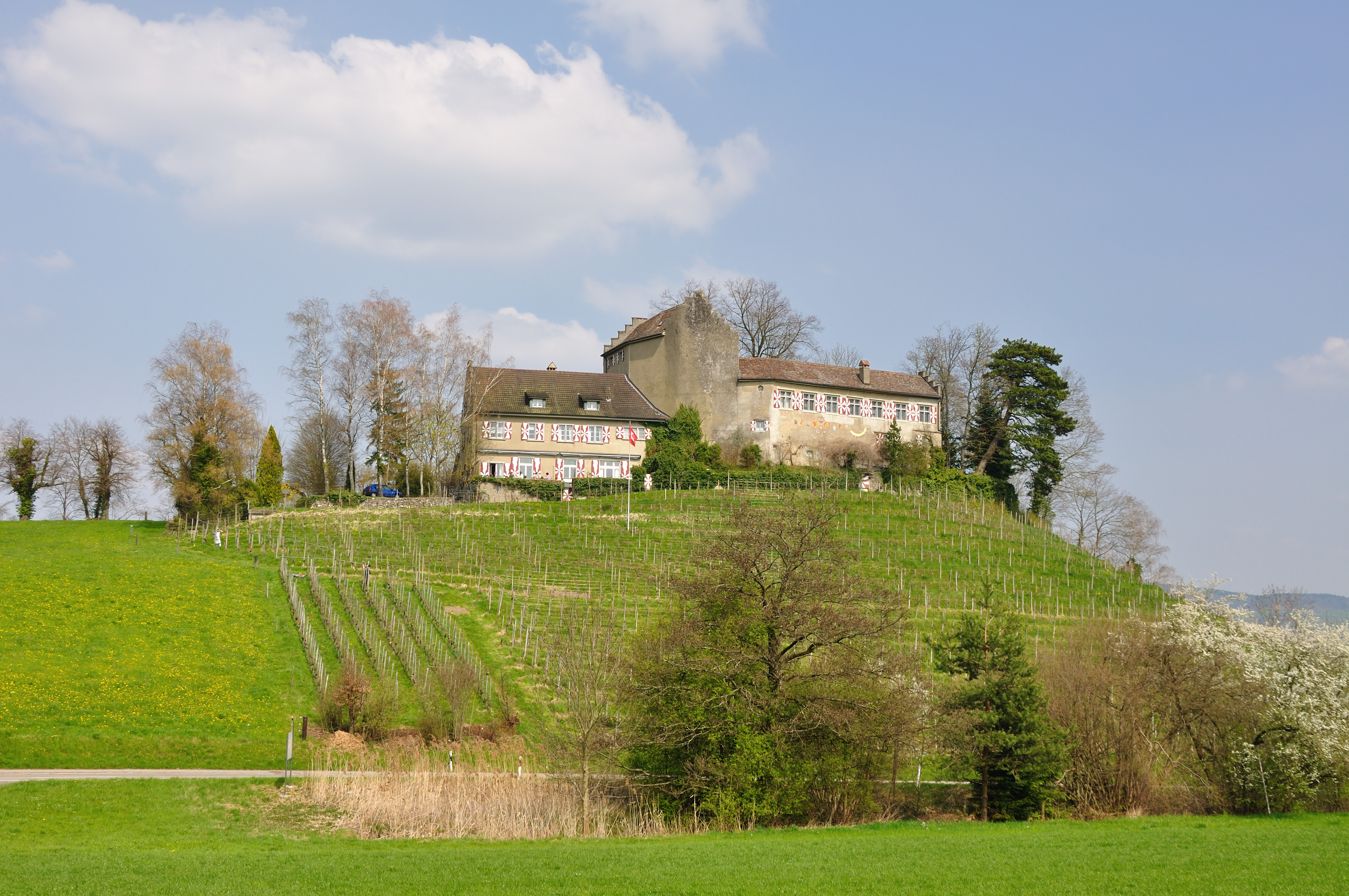 Switzerland, Canton of Zürich, Schloss Waltalingen